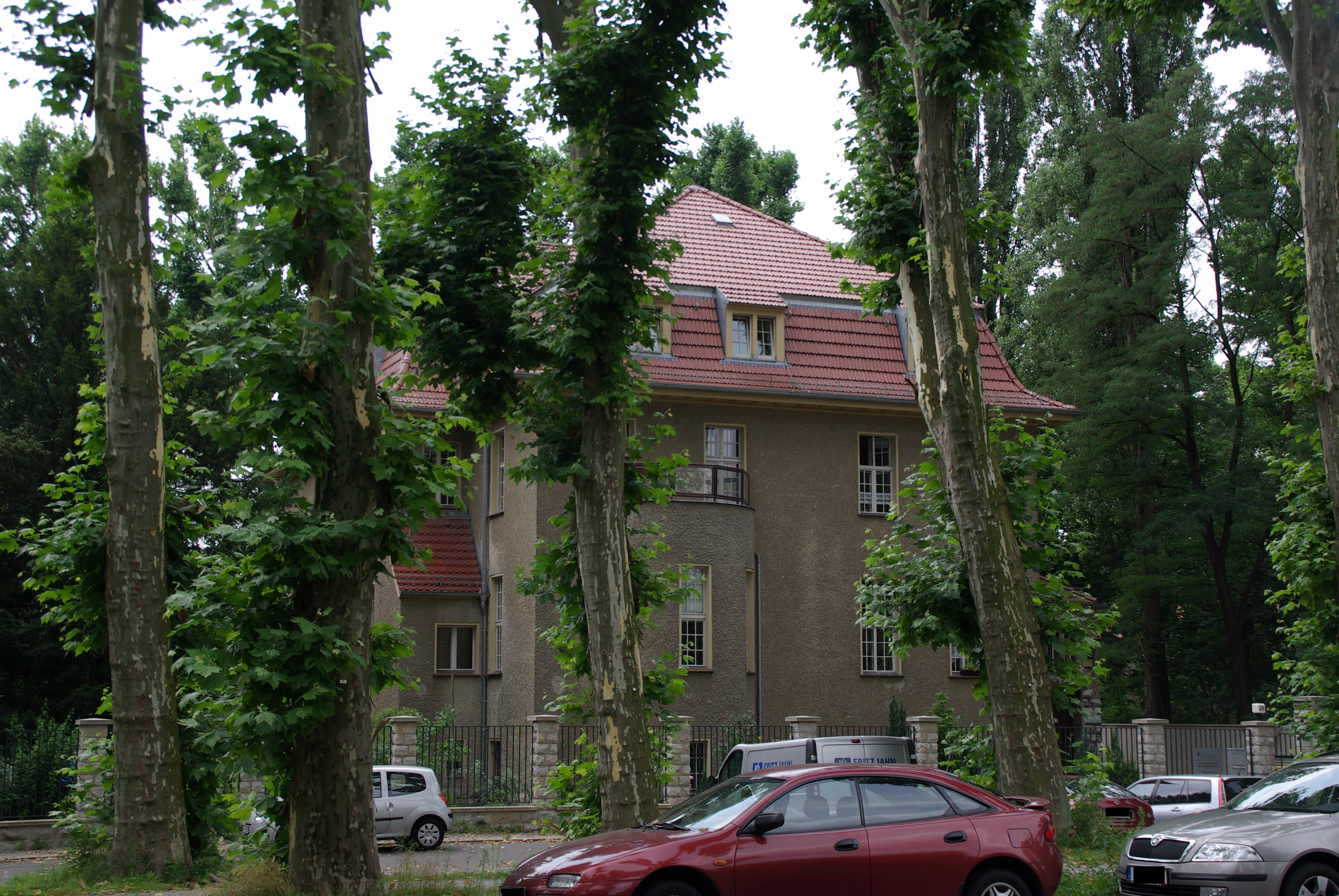 Berlin, Alt Treptow. Das Haus Puschkinallee 49 steht unter Denkmalschutz.